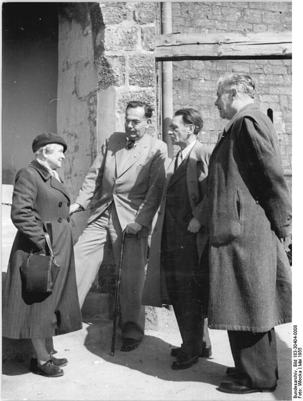 Zentralbild TBD Wlocka 8.5.1955 Zweiter gesamtdeutscher Dichter- und Schriftstellertag in der Wartburgstadt Eisenach. Vom 5. bis 7.5.1955 fand in der Wartburgstadt Eisenach der zweite gesamtdeutsche Dichter- und Schriftstellertag statt. Unter den Gästen befanden sich Vertreter aus Westdeutschland, Polen, der CSR und ein Vertreter aus Indien. UBz: Während einer Tagungspause die Schriftsteller im Gespräch. (Von links nach rechts) Die polnische Dichterin Frau Dabrowski aus Warschau, der Weimarer Schriftstelle Louis Fürnberg, der polnische Dichter Dr. Jastrun aus Warschau und der Generalsekretär des tschechoslowakischen Schriftstellerverbandes Herr Sekera aus Prag auf dem Hof der Wartburg.